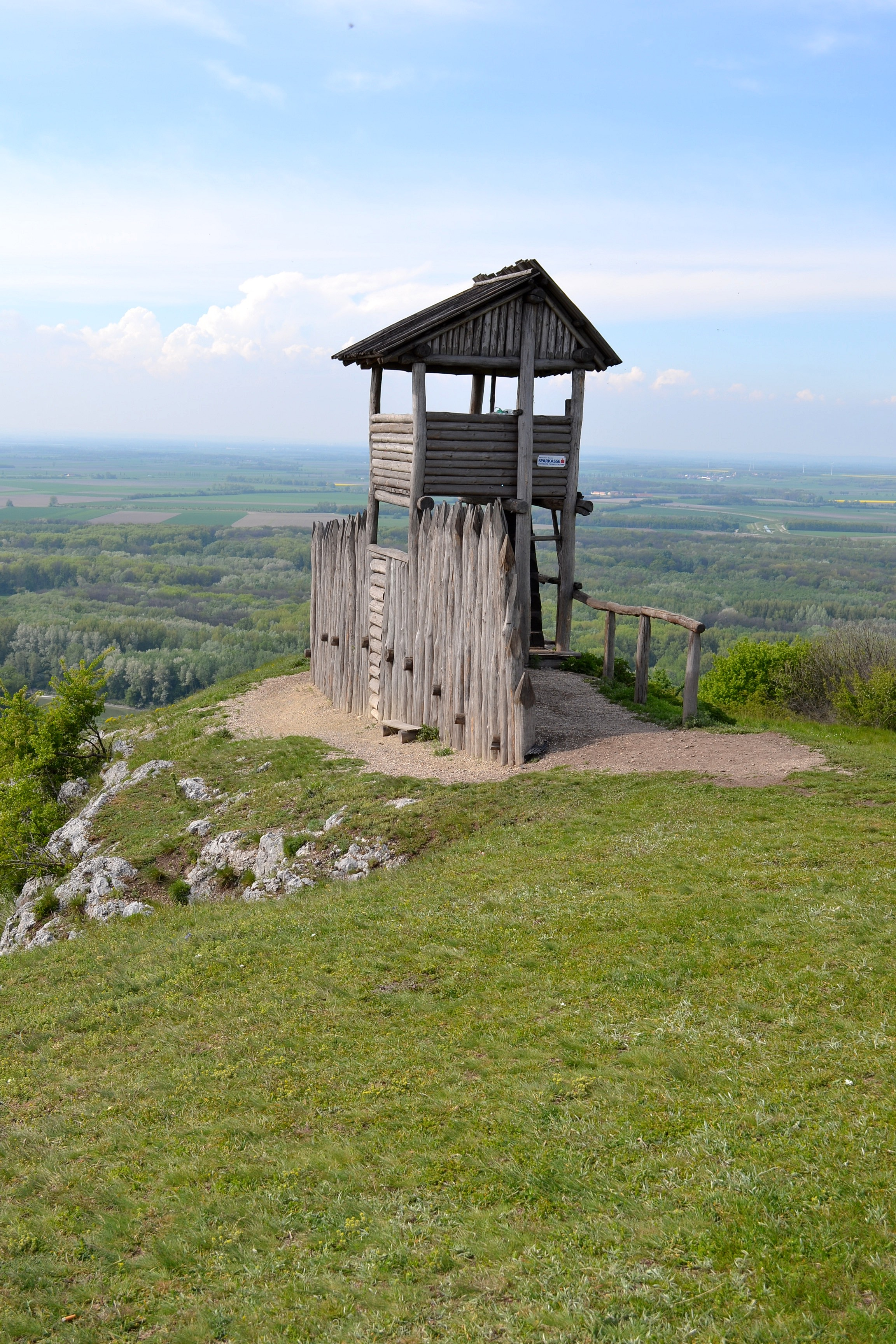 Rekonštrukcia veže a palisády na niekdajšom keltskom hradisku